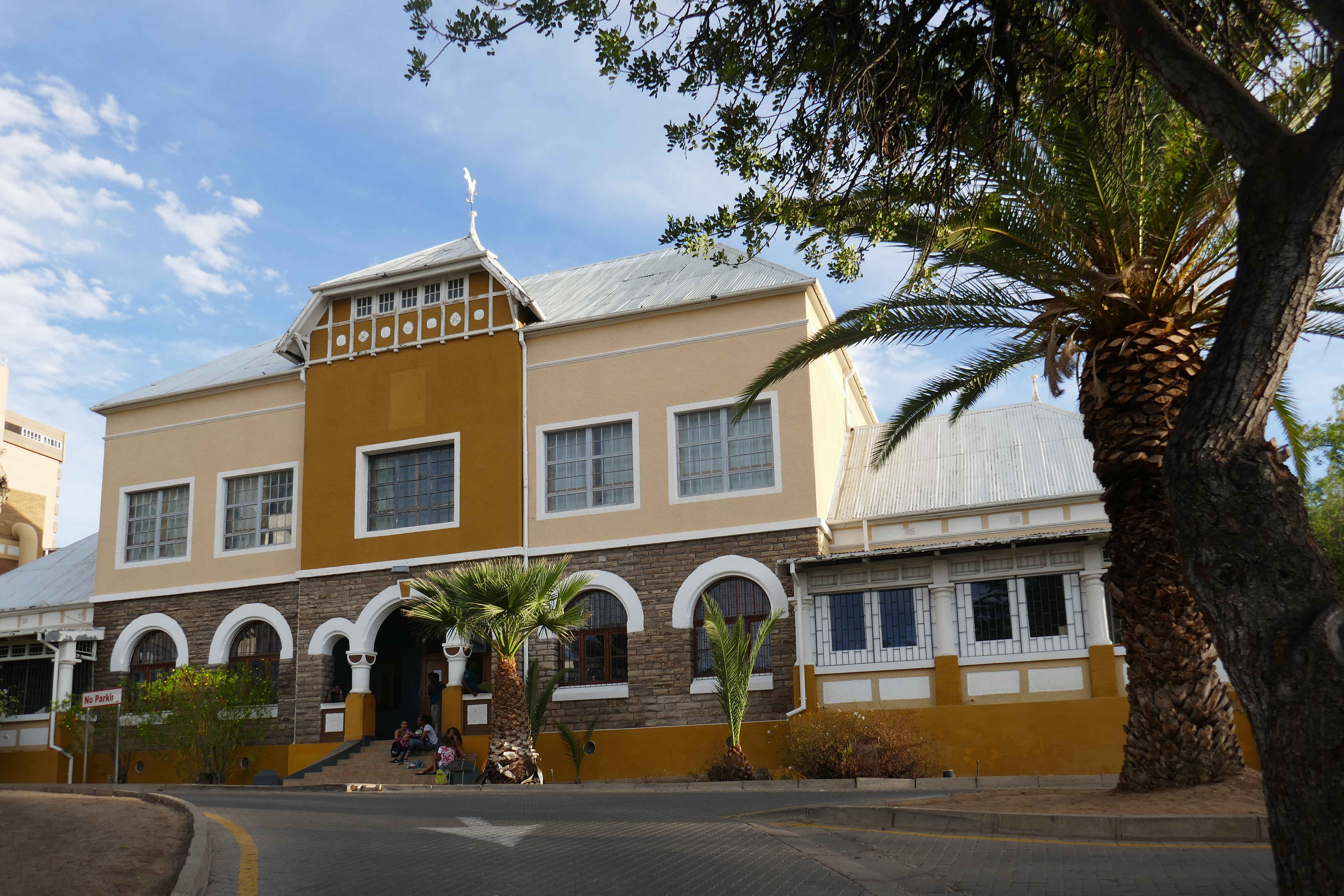 Le College of the Arts à Windhoek (Namibie).